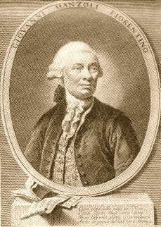 The Italian castrato, Giovanni Manzuoli